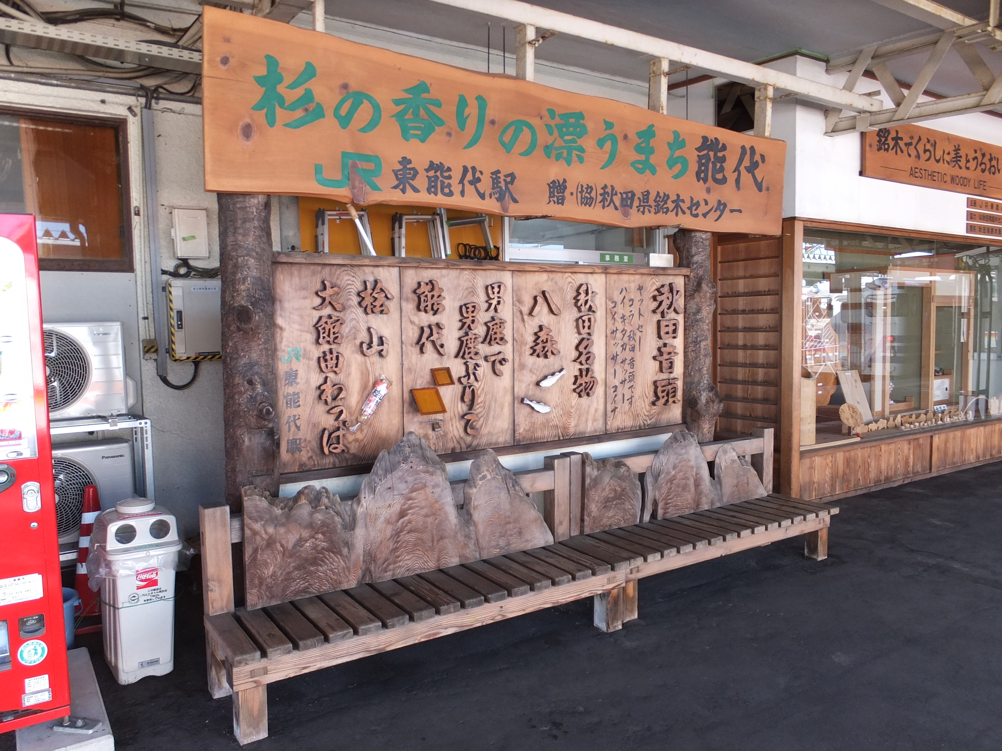 東能代駅ベンチ。秋田音頭の案内板つき。五能線沿線の「八森」の下はハタハタ、「能代」の下は能代春慶塗、「桧山」の下は檜山納豆である。